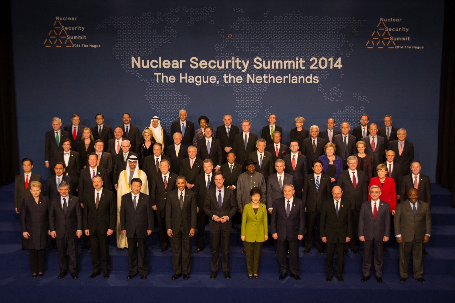 25-03-2014 Fotografia Oficial da Cúpula de Segurança Nuclear 2014 (Nuclear Security Summit 2014), em Haia Fotos: Michel Temer